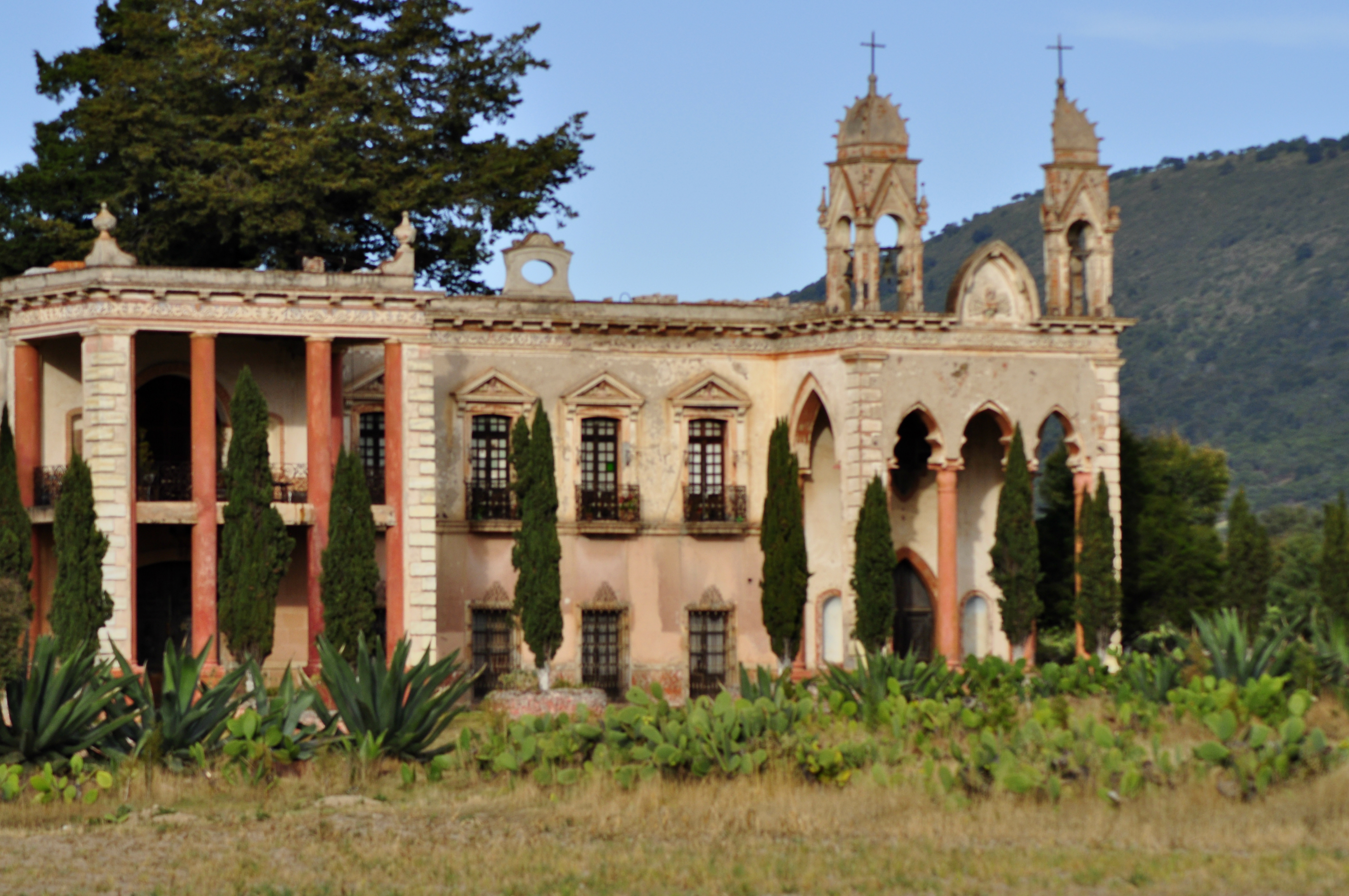 Exterior de la capilla. Actualmente es una hacienda privada.